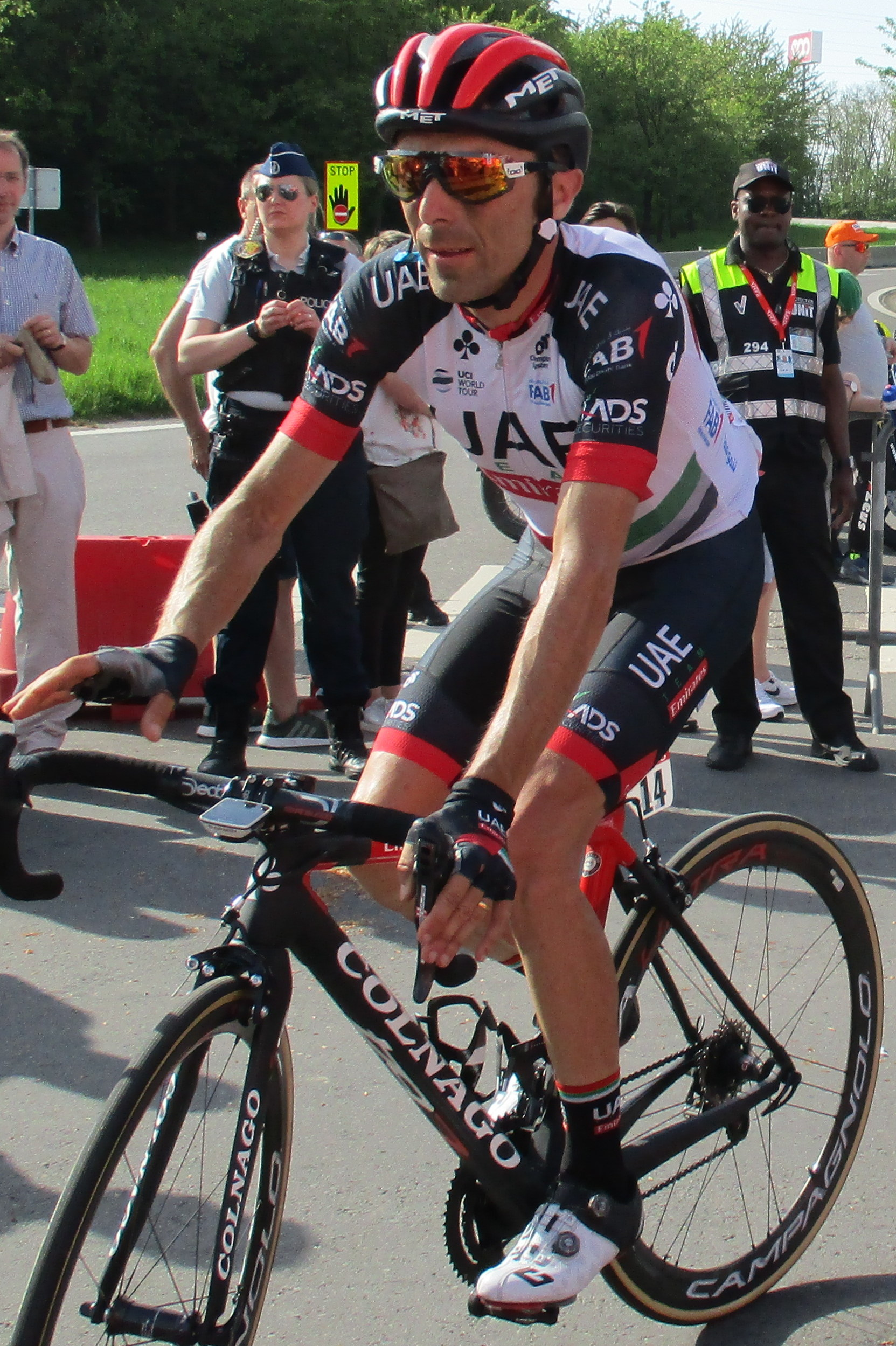 Finish van Luik-Bastenaken-Luik 2018 in Ans.